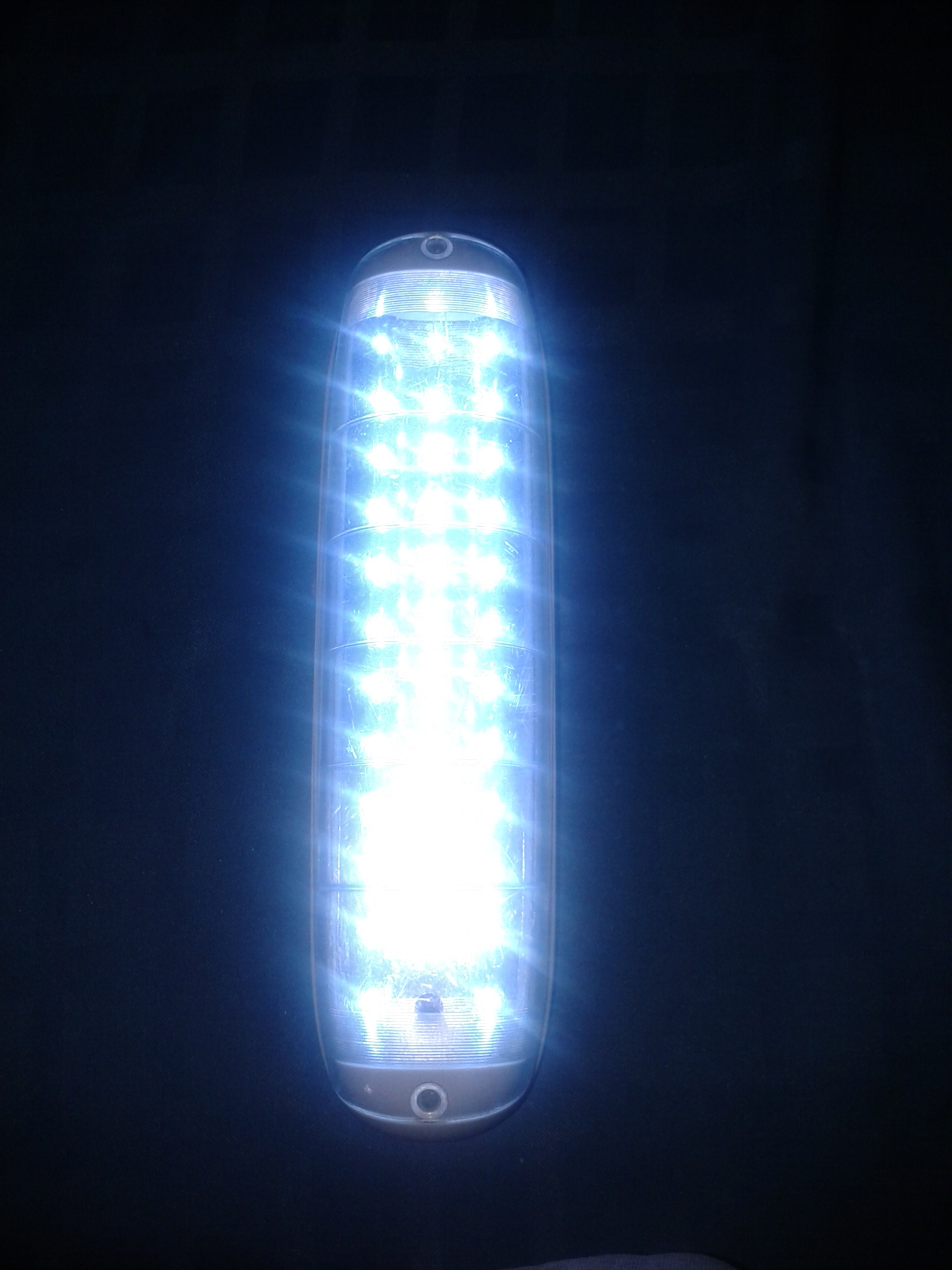 Luz de emergencia